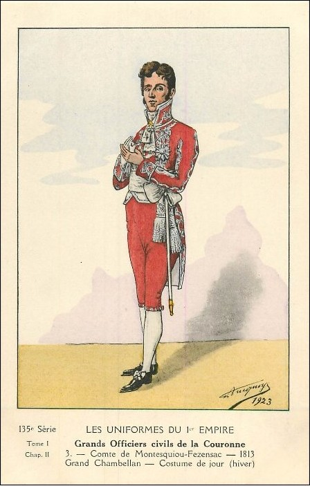 Les uniformes du Ier Empire - Grands Officiers Civils de la Couronne - 3 Comte de Montesquiou-Fezensac - 1813 Grand Chambelan - Costume de jour (hiver).